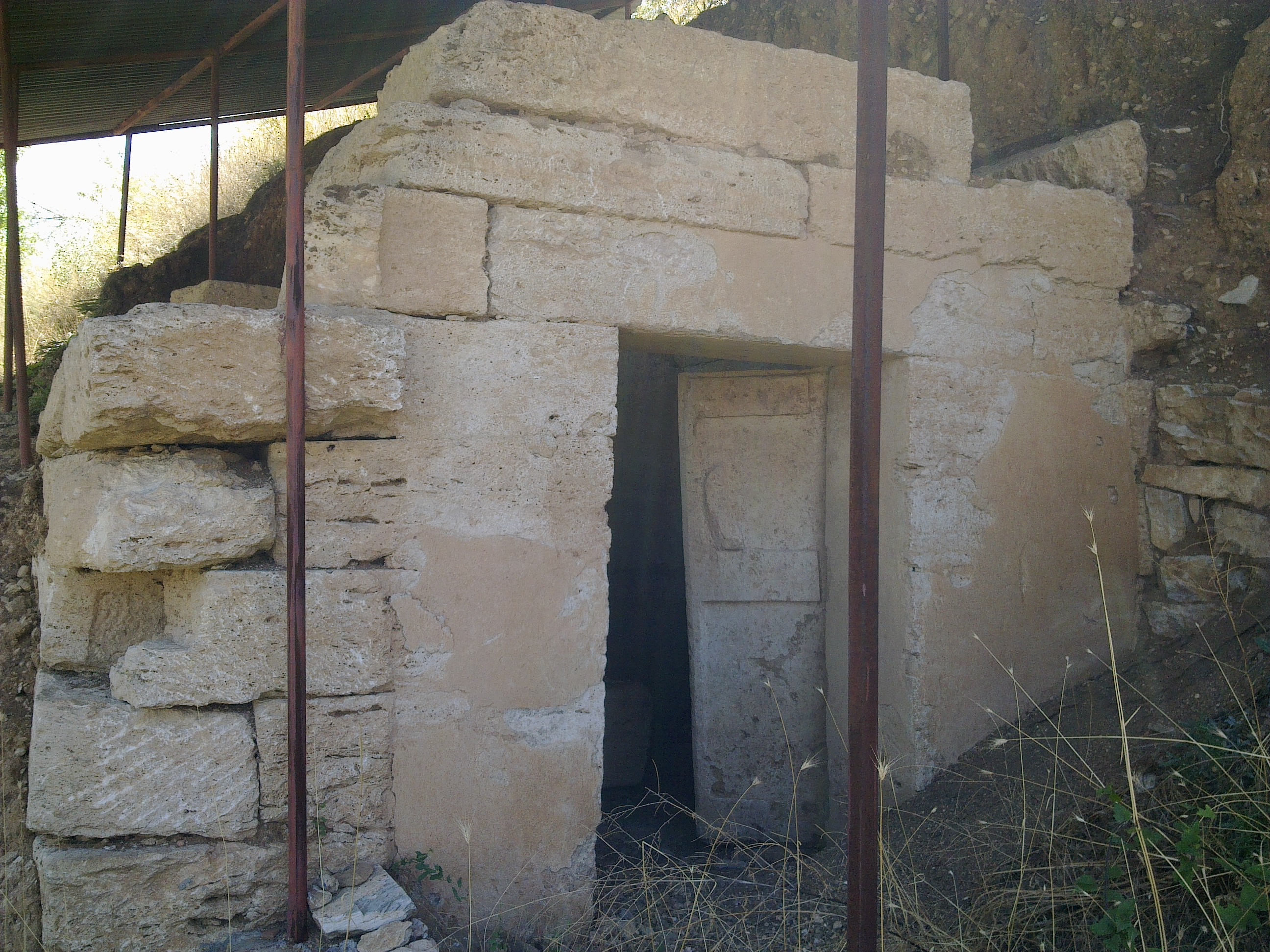 Македонската гробница край Катраница.